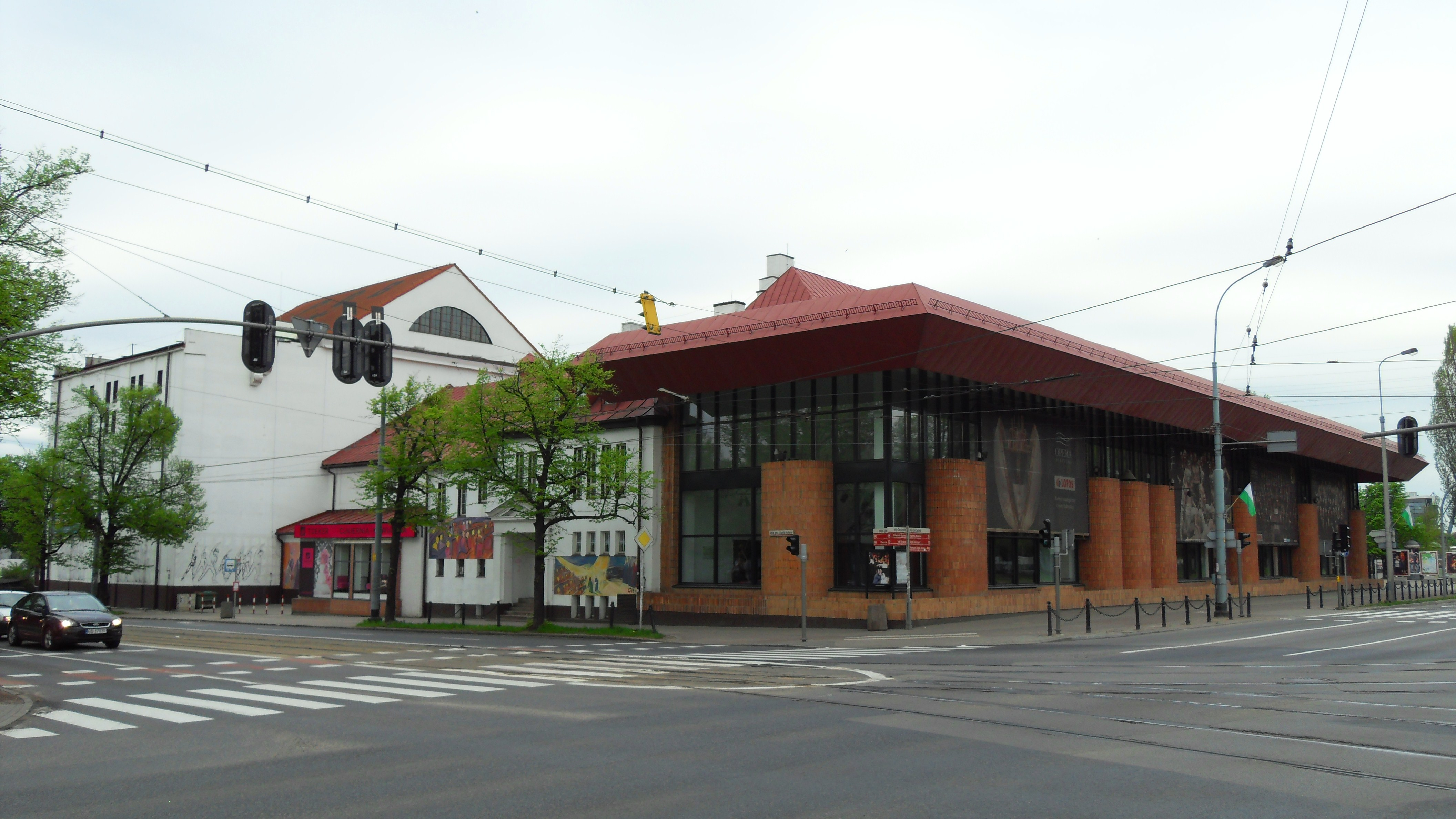 Gdańsk Aniołki, Opera Bałtycka i skrzyżowanie al. Hallera z al. Zwycięstwa.